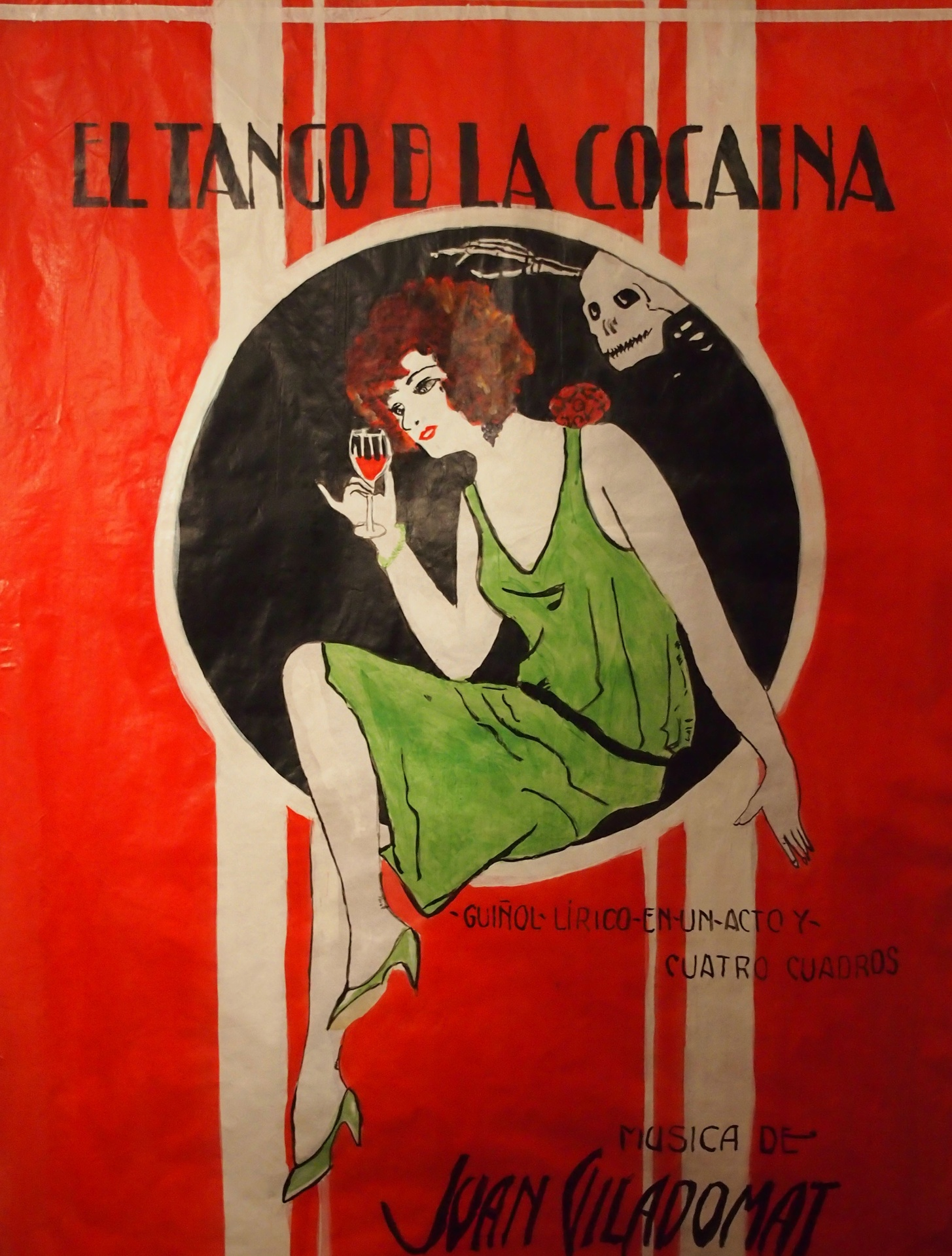 El Tango de la cocaina ; Juan Giladomat